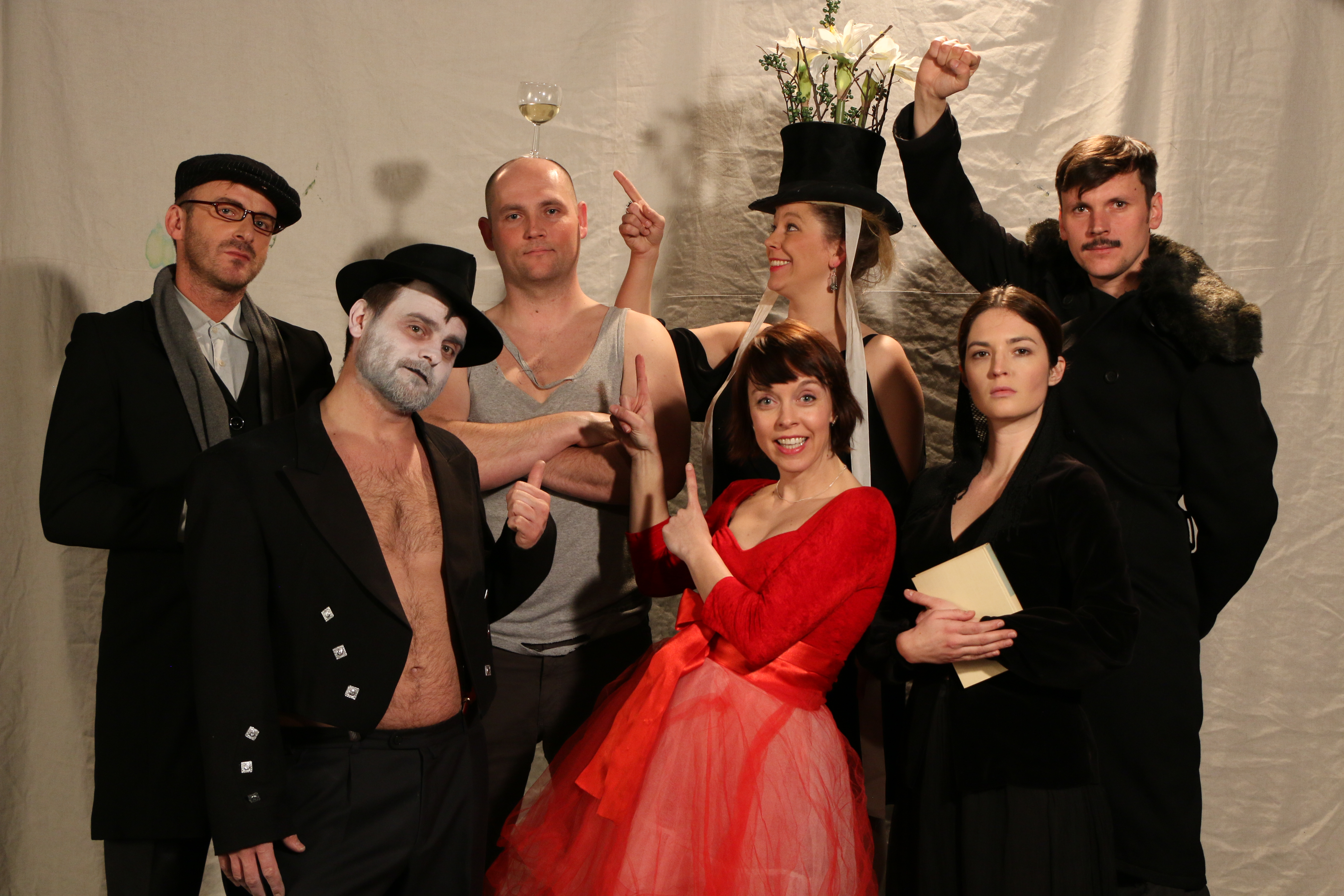 Fotografie zobrazuje herecký soubor Divadla D21. Místo pořízení: Divadlo D21, Praha 2.